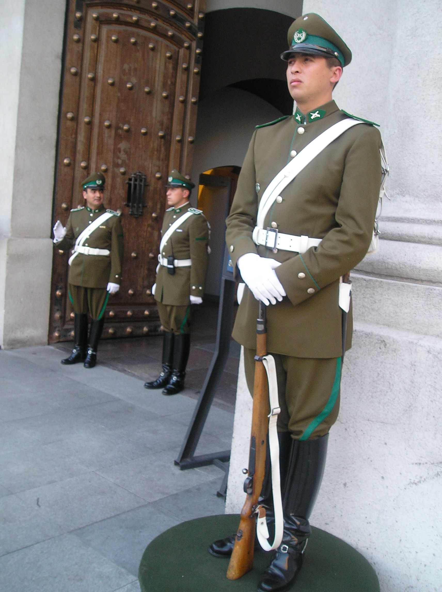 Foto obtenida por el autor el 18 de Julio de 2006 en Santiago, Chile.